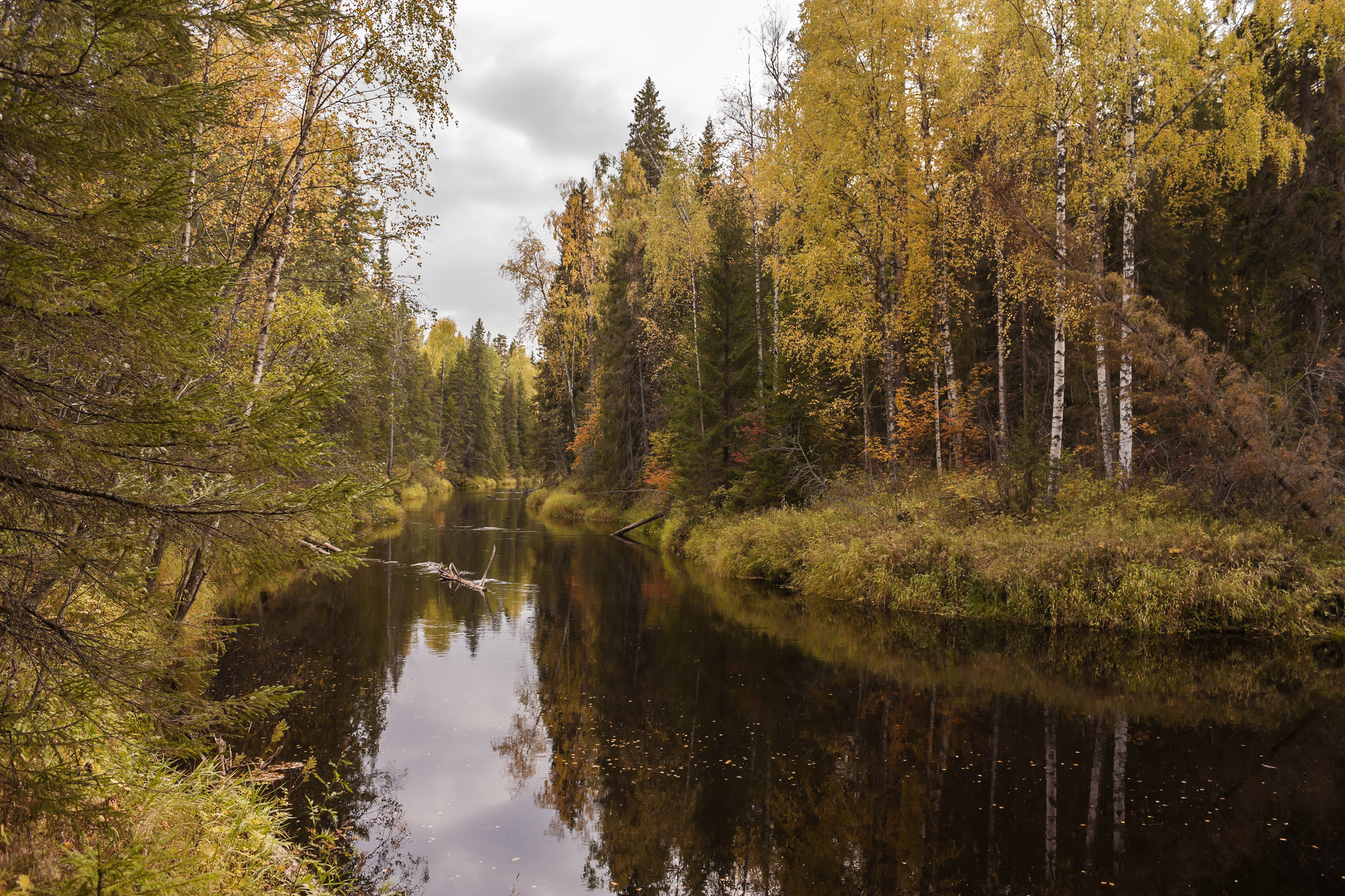 река Мехреньга в районе Елсозера в начале сентября 2015г. Архангельская область